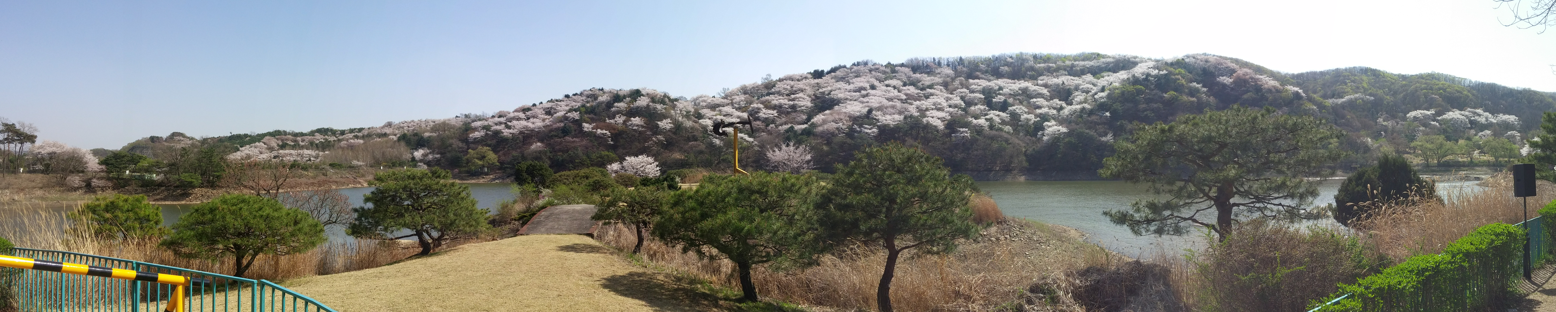 호암 벚꽃 축제 파노라마